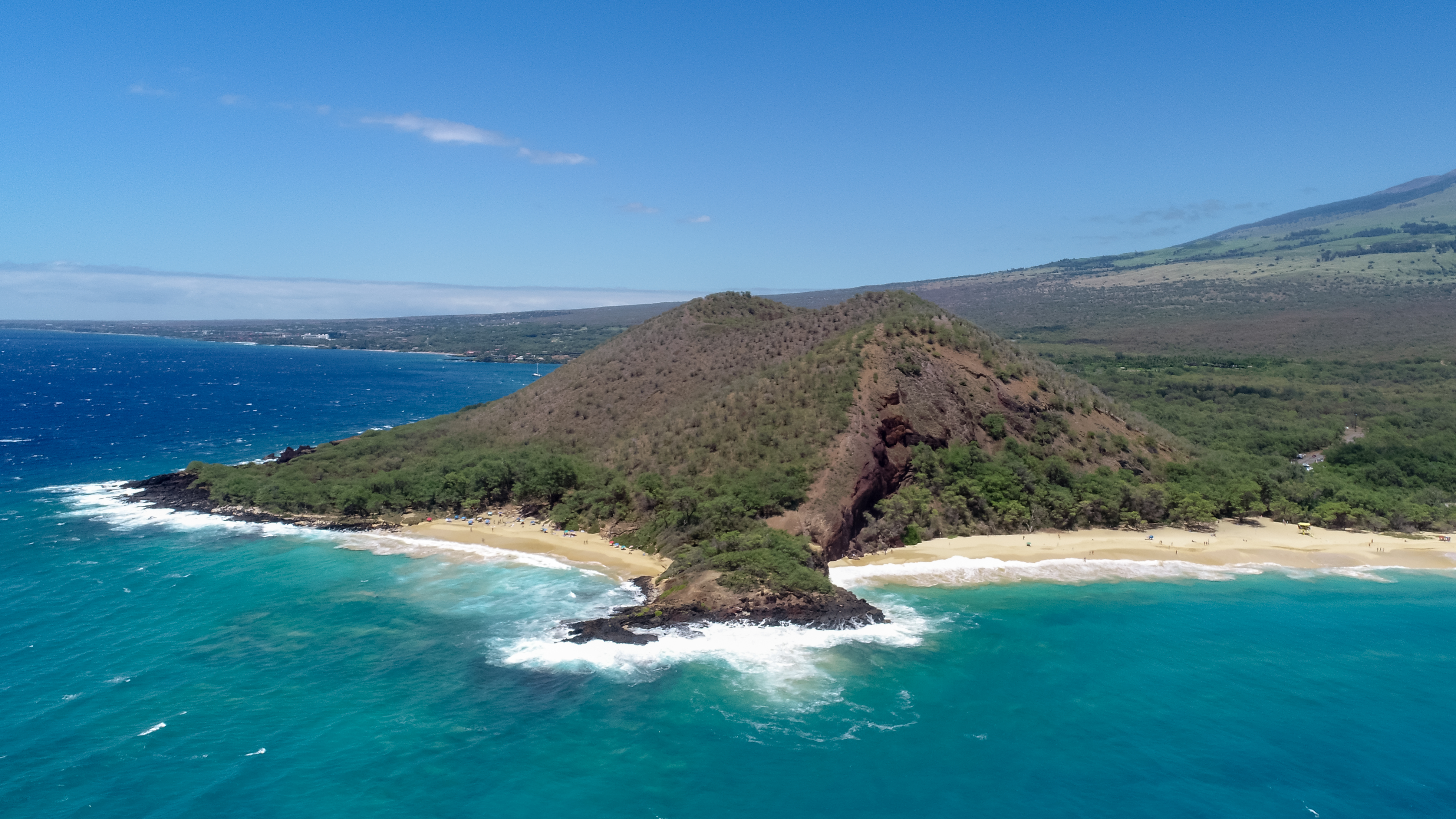 Makena Beach, Maui Hawaii